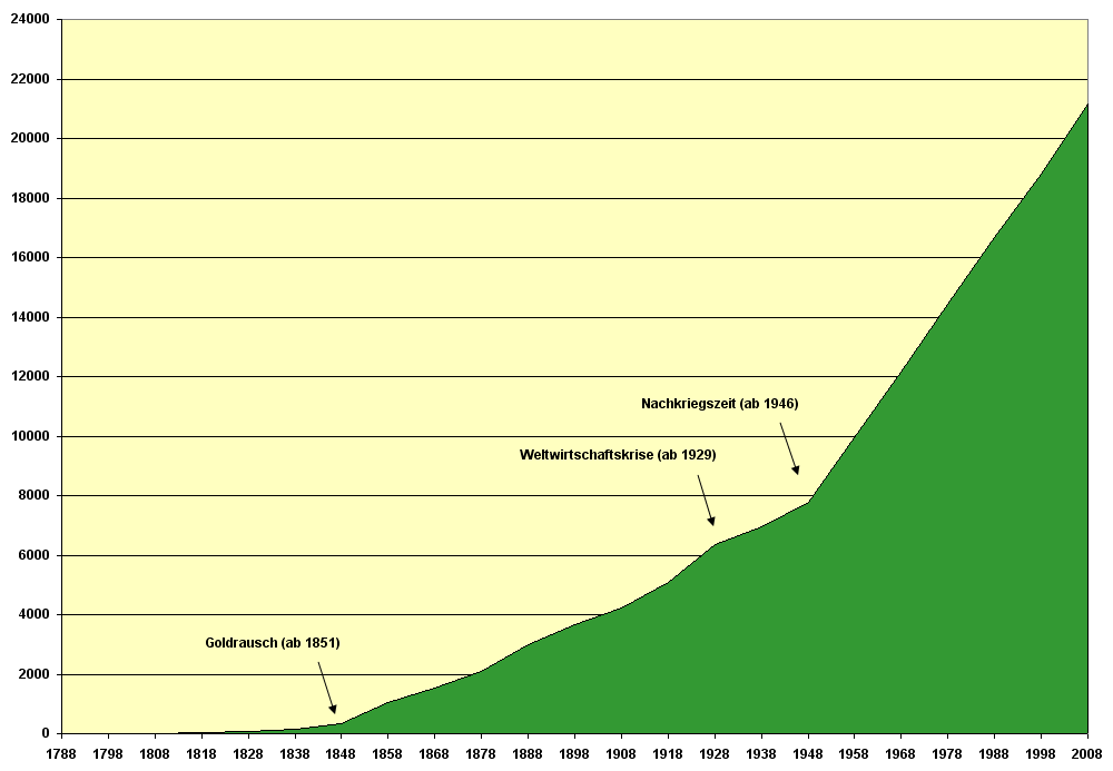 Bevölkerungsentwicklung Australiens von 1788 bis 2008 (in 1000) einschließlich zusätzlichen Hinweisen.